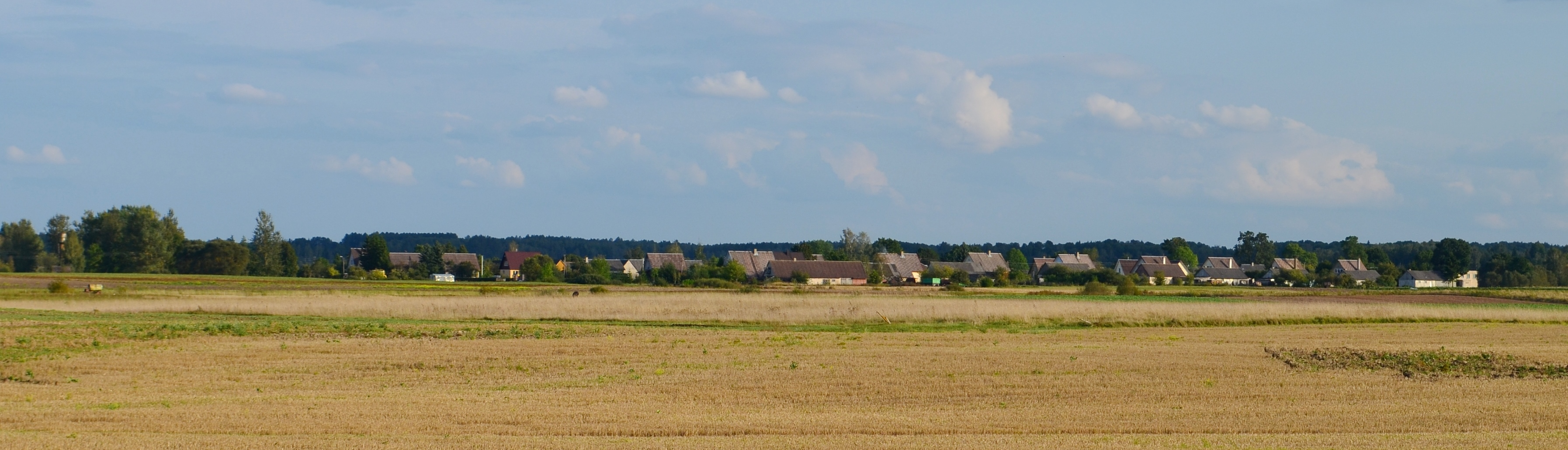 Žeimiai, Radviliškio raj.